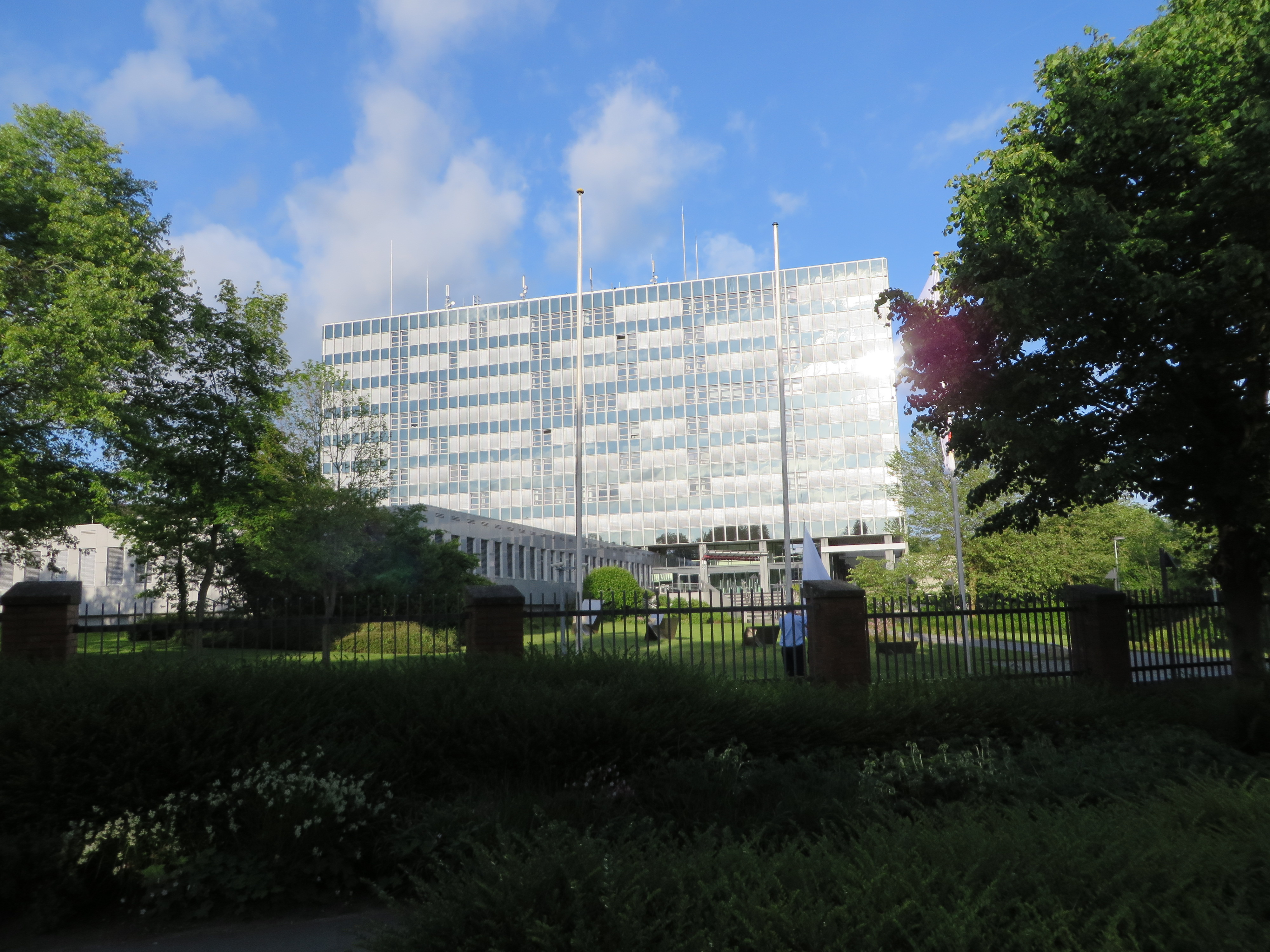 Kraftfahrt-Bundesamt (Fenster mit Rollos bilden an dem Tag Abkürzung KBA), Flensburg-Mürwik Mai 2014, Bild 02